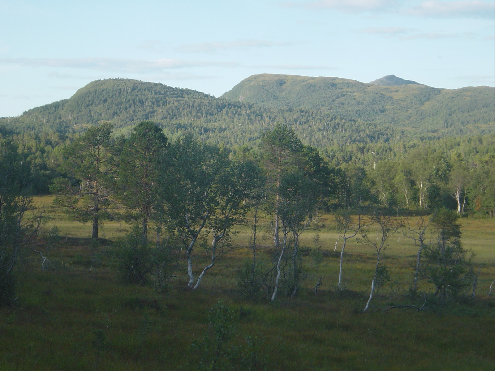 Gjemnes and the Fursetfjellet